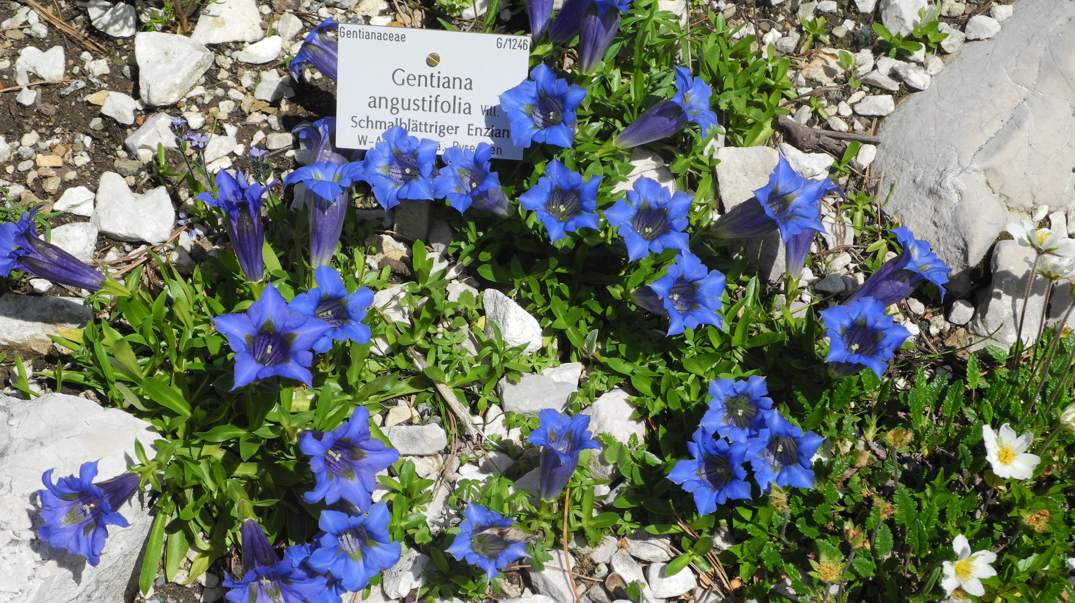 Schmalblättriger Enzian (Gentiana angustifolia) im ʽAlpengarten Schachenʼ.